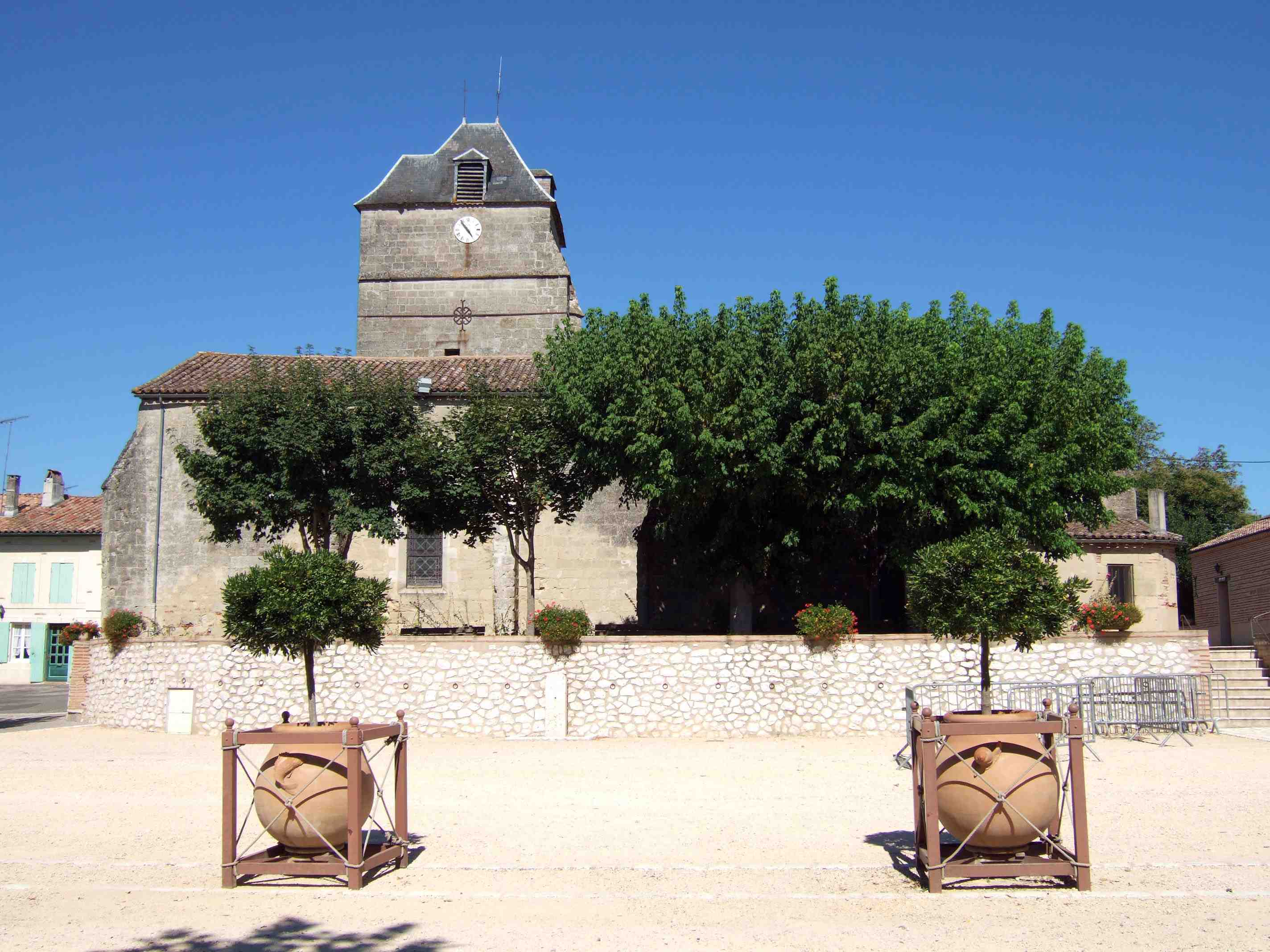 Eglise Saint-Jean-Baptiste de Fauillet 47400 FRANCE